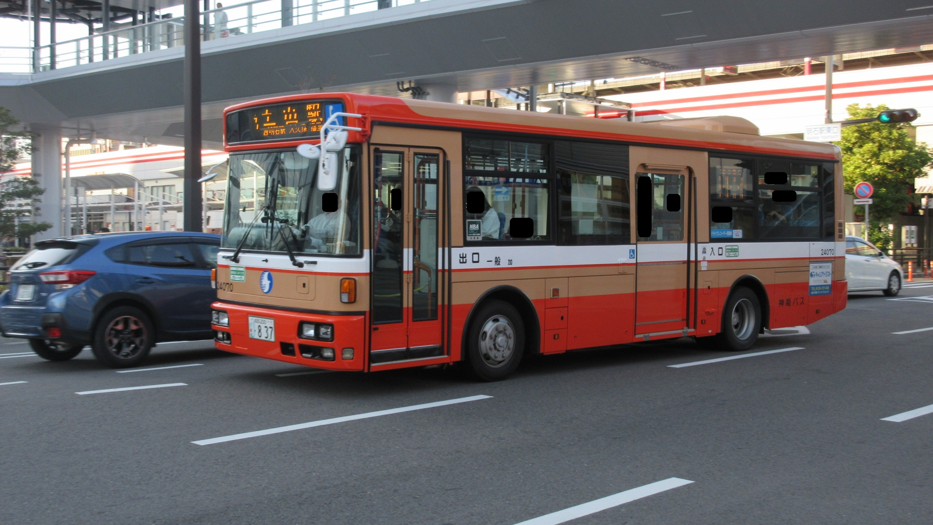 神姫バス 加24070（明石駅東口） ※ラグビーナンバー装着